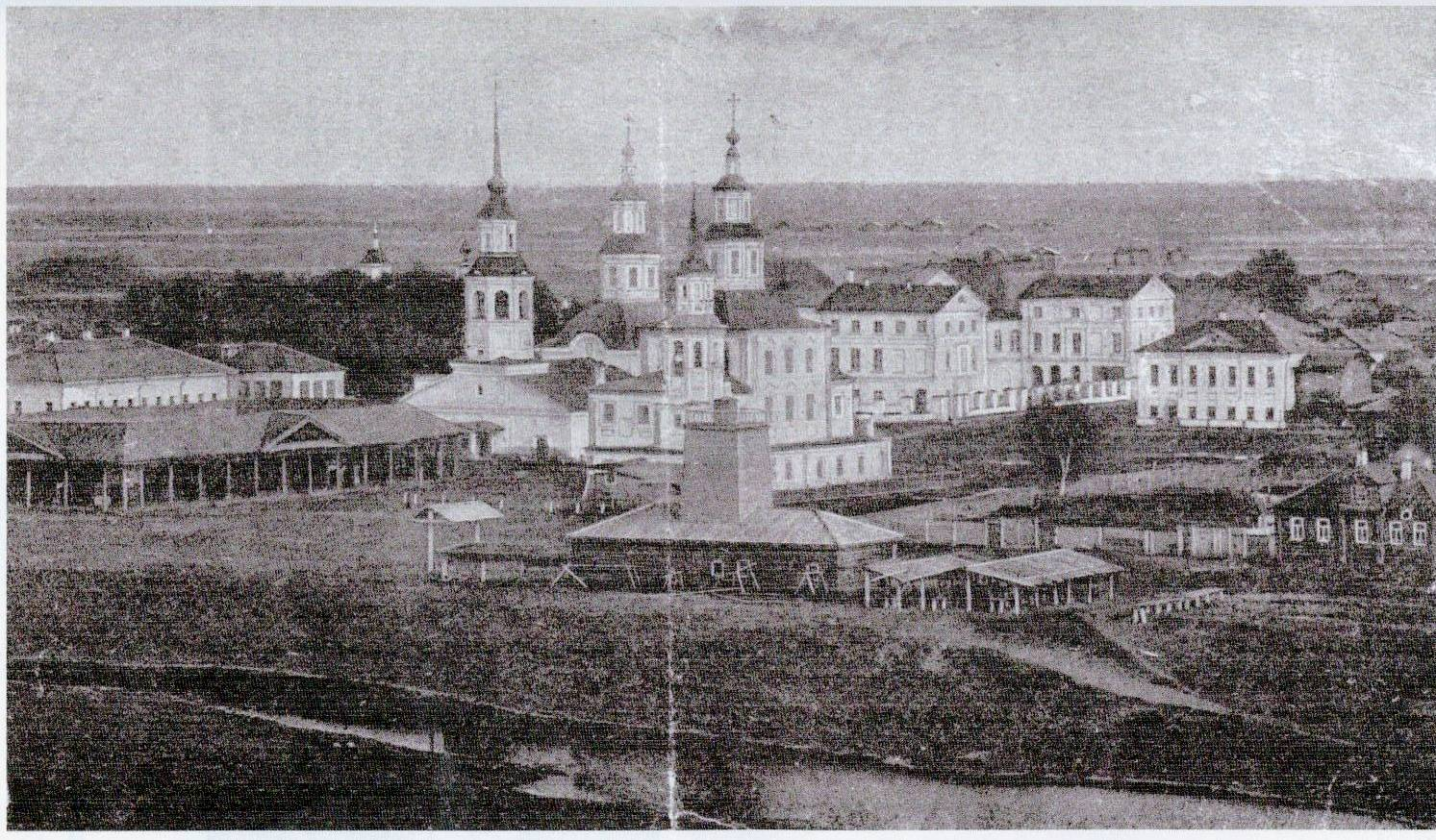 Сольвычегодск. Центр города. На фото нет дома Ионовых, который был построен в конце XIX - начале XX века